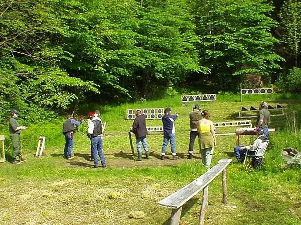 Feltskyting hos APK, Arenda, Norway